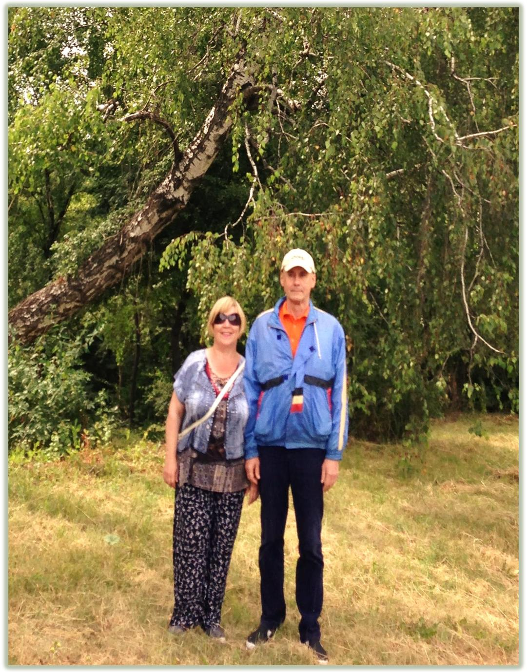 Скумін В.А.,Бобіна Л.А.,2016